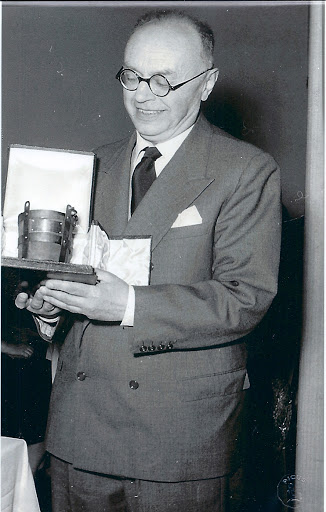 Giovanni Cavicchioli riceve il premio "La Secchia" 1957 conferito dall'Associazione della stampa modenese quale riconoscimento della sua attività letteraria